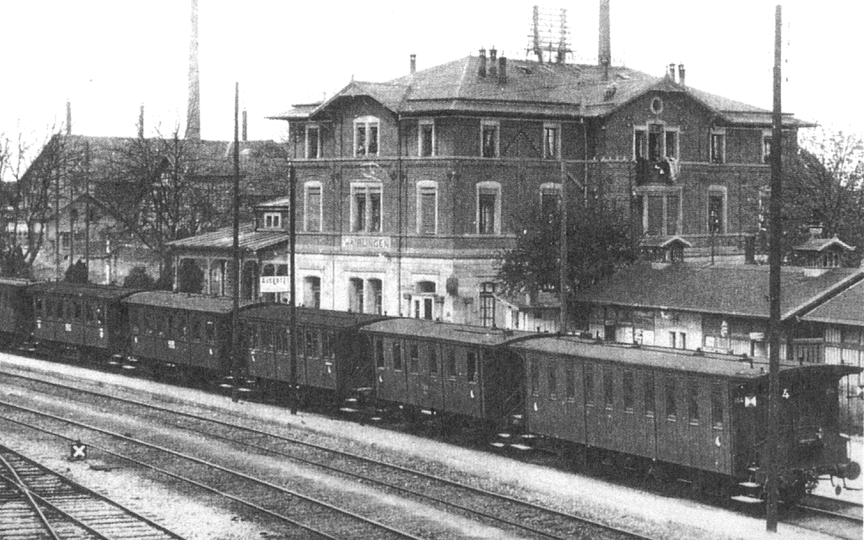 Bahnhof in Waiblingen mit seinem zweiten Empfangsgebäude.